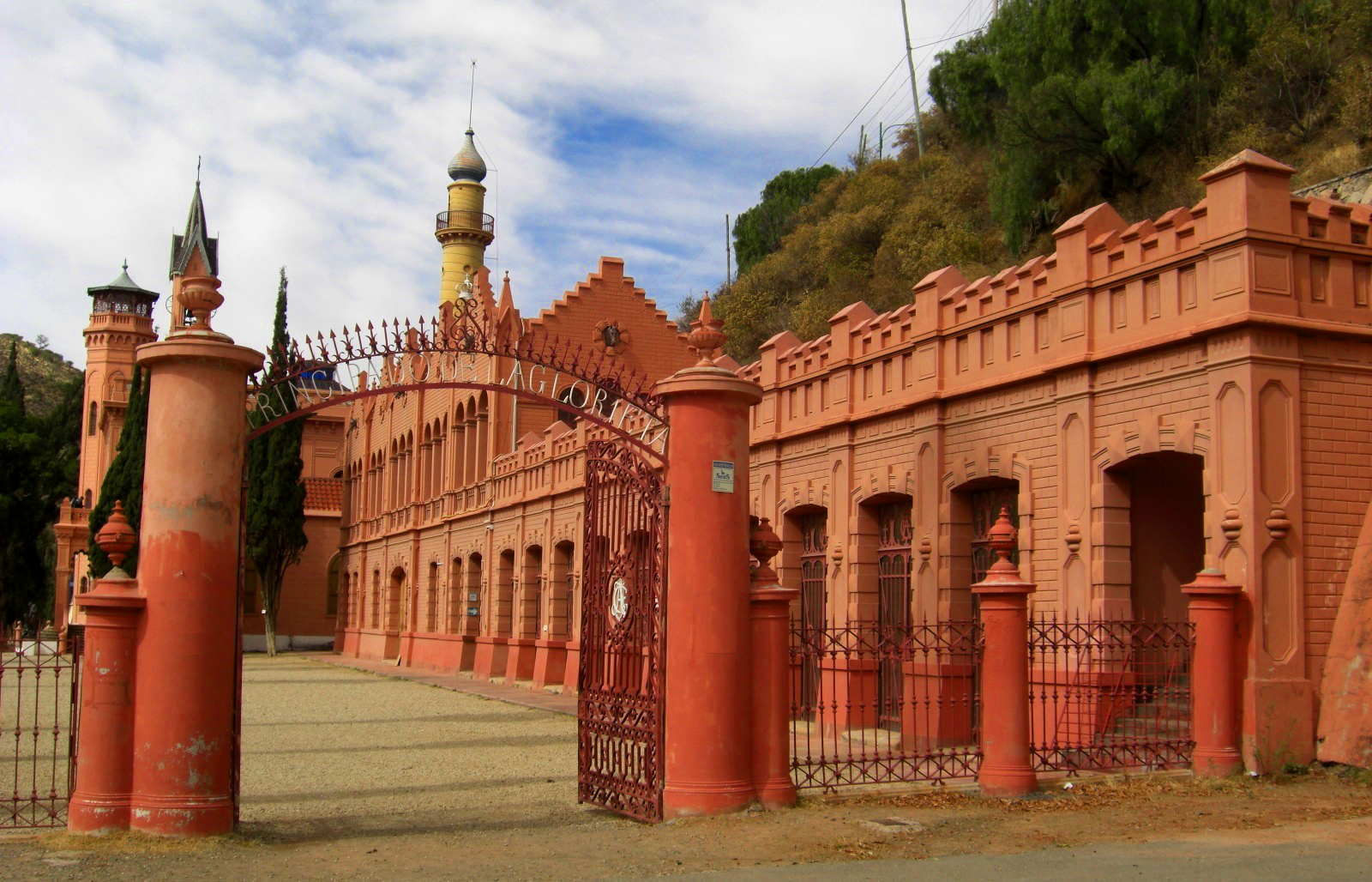 La Glorieta This medium shows the protected monument with the number H/00-035 in Bolivia.